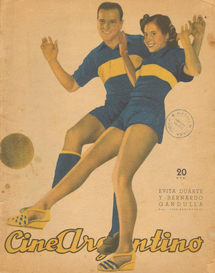 EVITA DUARTE y BERNARDO GANDULLA.